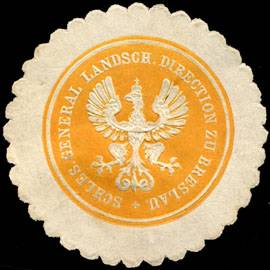 Sealing stamp Title: Schlesische General Landschafts Direction zu Breslau Description: gelb, weiß, geprägt Place: Breslau size: 4 cm